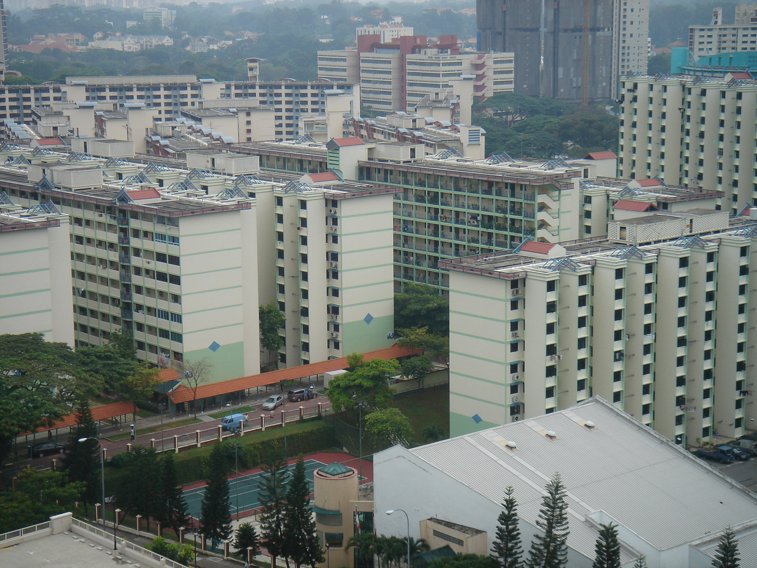 Bukit Ho Swee Estate, Singapore.